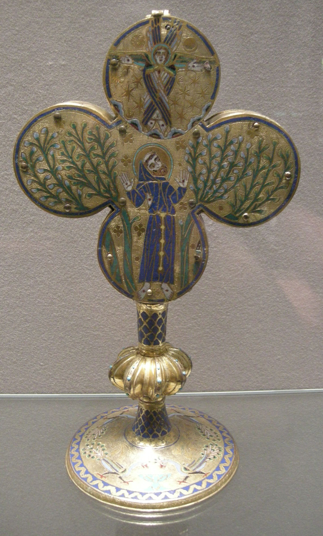 Reliquairio di san francesco d'assisi, limoges dopo 1228.JPG or Reliquaire : saint François d'Assise recevant les stigmates ; vers 1228 -1230